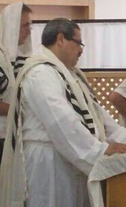 רוני אלשיך